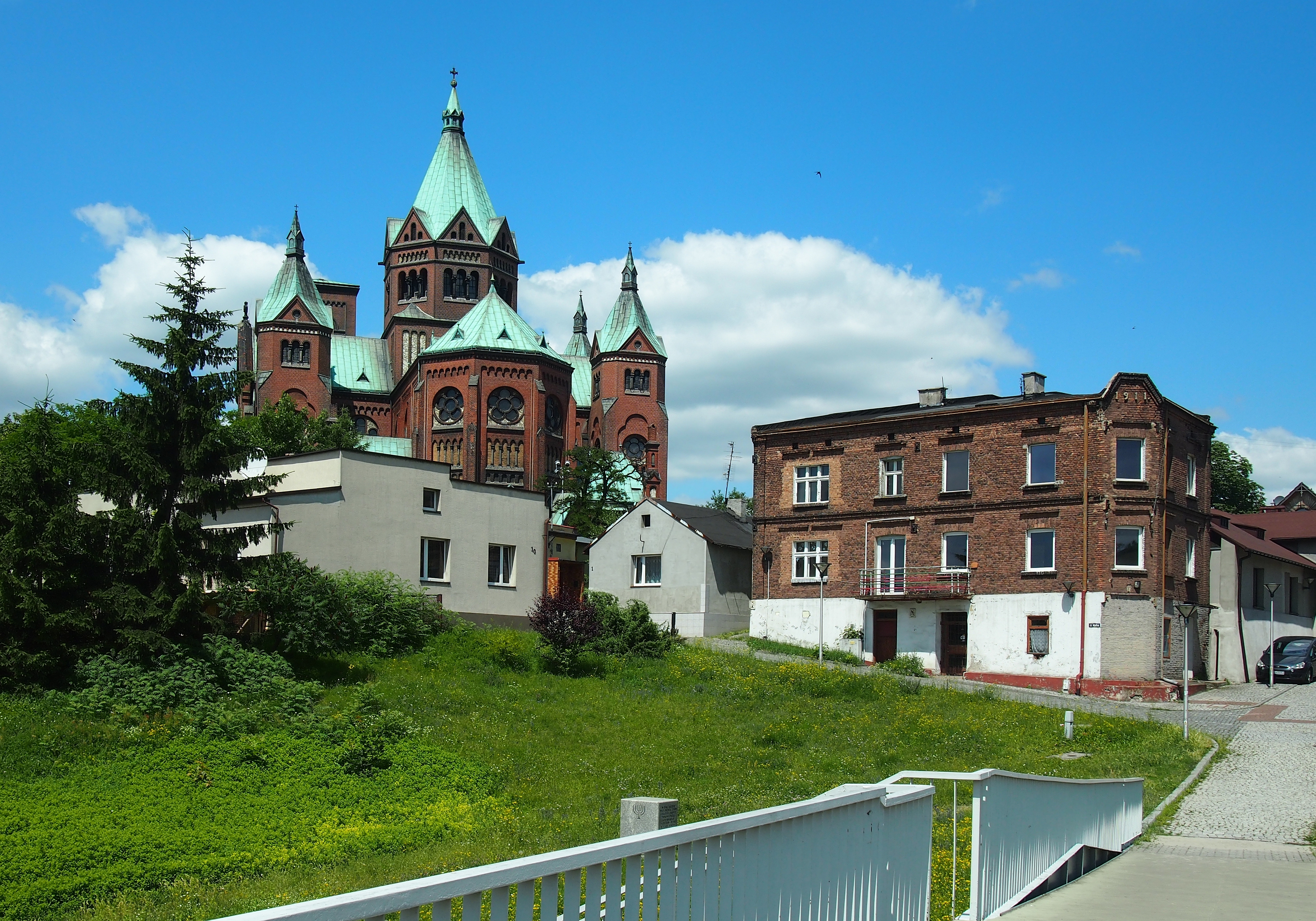 Widok na miasto od strony ulicy Katowickiej. W głębi widoczny Kościół św. Stanisława.